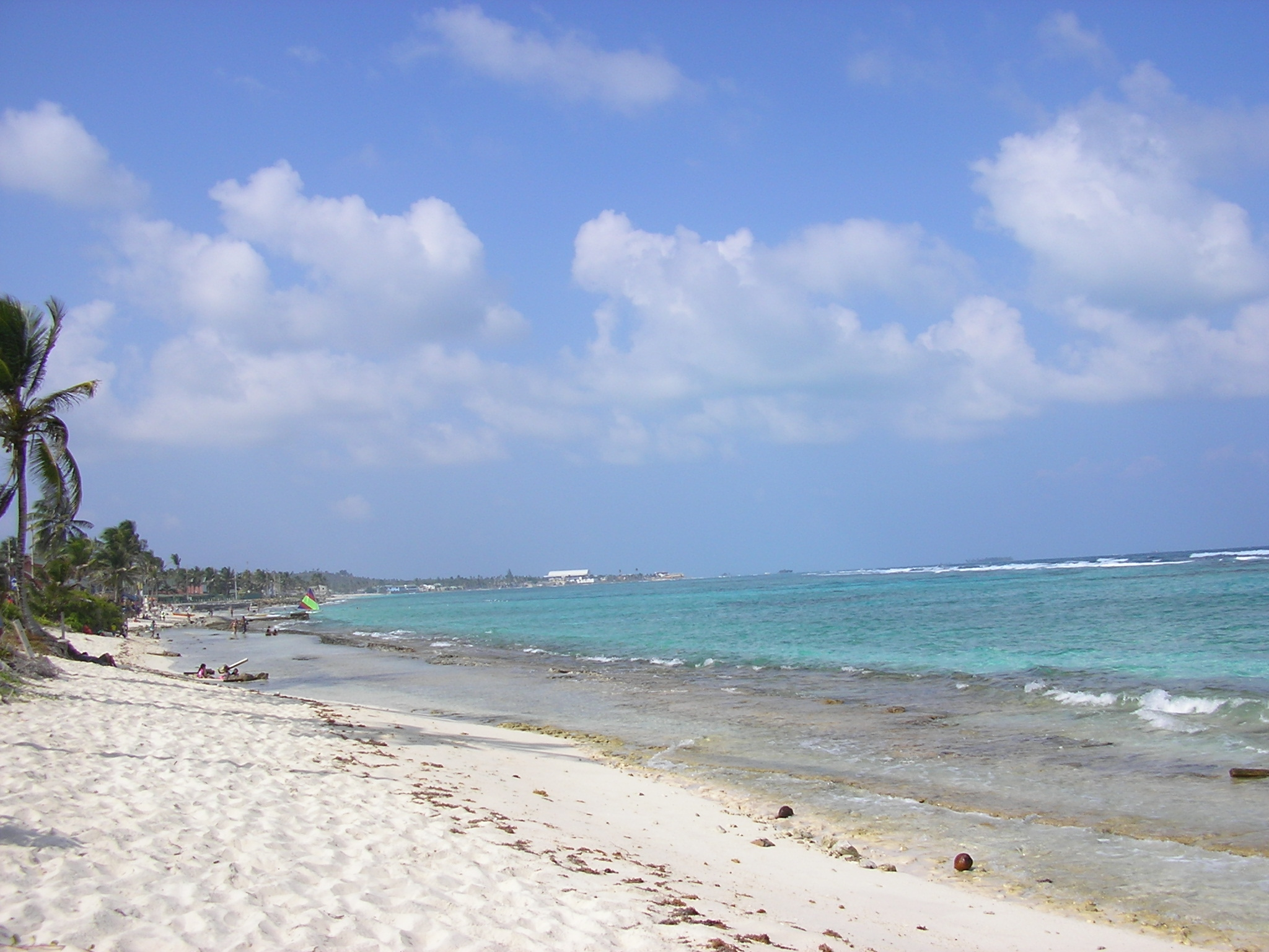 Playa en San Andres